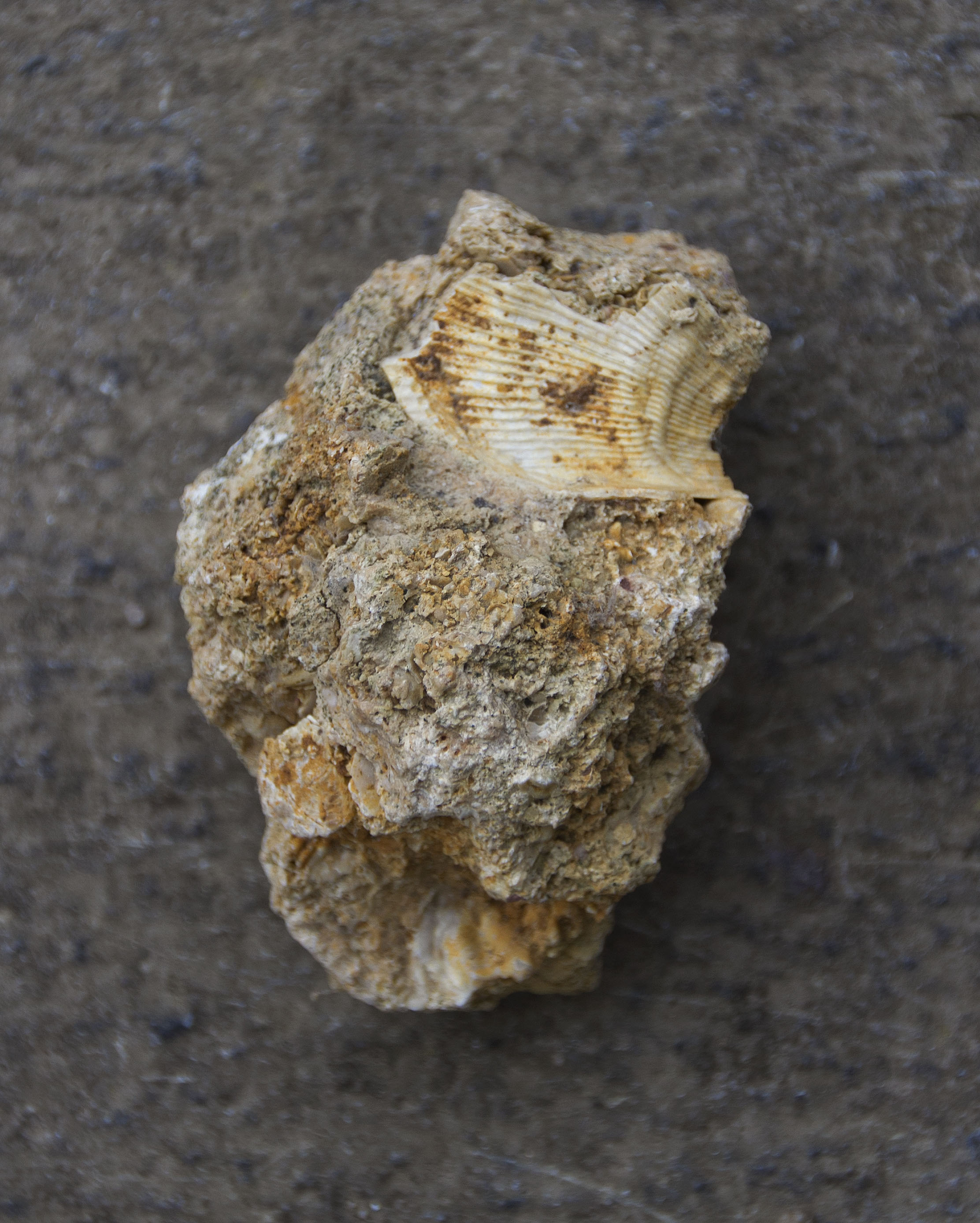 Sarrasin de Bettrechies (Tourtia) - Nord de la France.